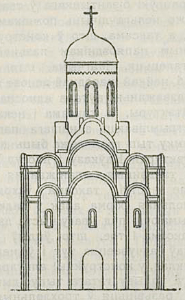 Беларуская (тарашкевіца): Полацак (Połacak), прадмесьце Спас (Spas). Царква Сьвятога Спаса, рэканструкцыя пачатковага выгляду